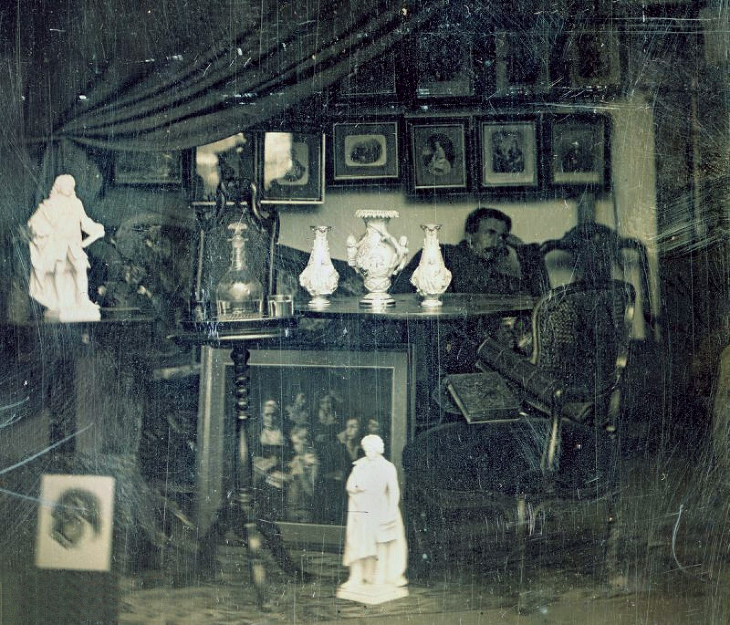 Blick in das Atelier Wehnert-Beckmann in Leipzig (Daguerreotypie)